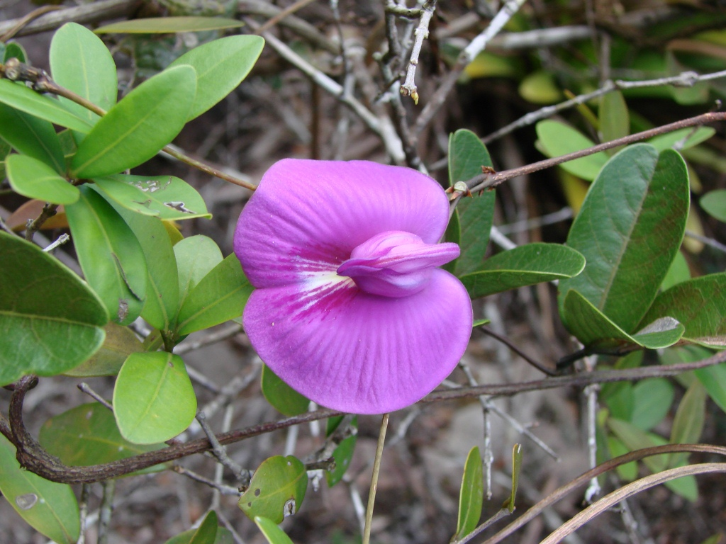 Periandra pujalu Emmerich & Senna - FABACEAE - Parque Natural Municipal do Morro do Pai Inácio - Chapada Diamantina - Palmeiras - Bahia - Brasil.